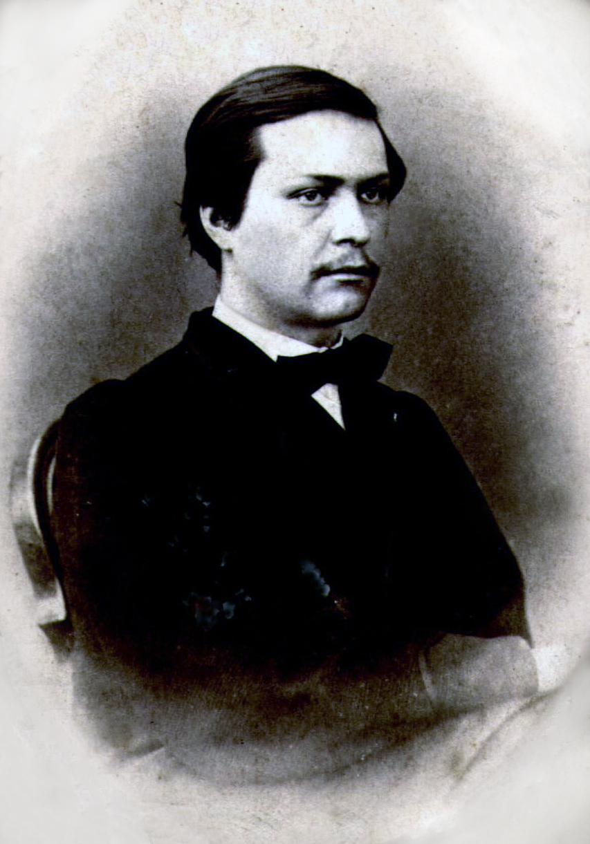 Фотопортрет Н. В. Лысенко